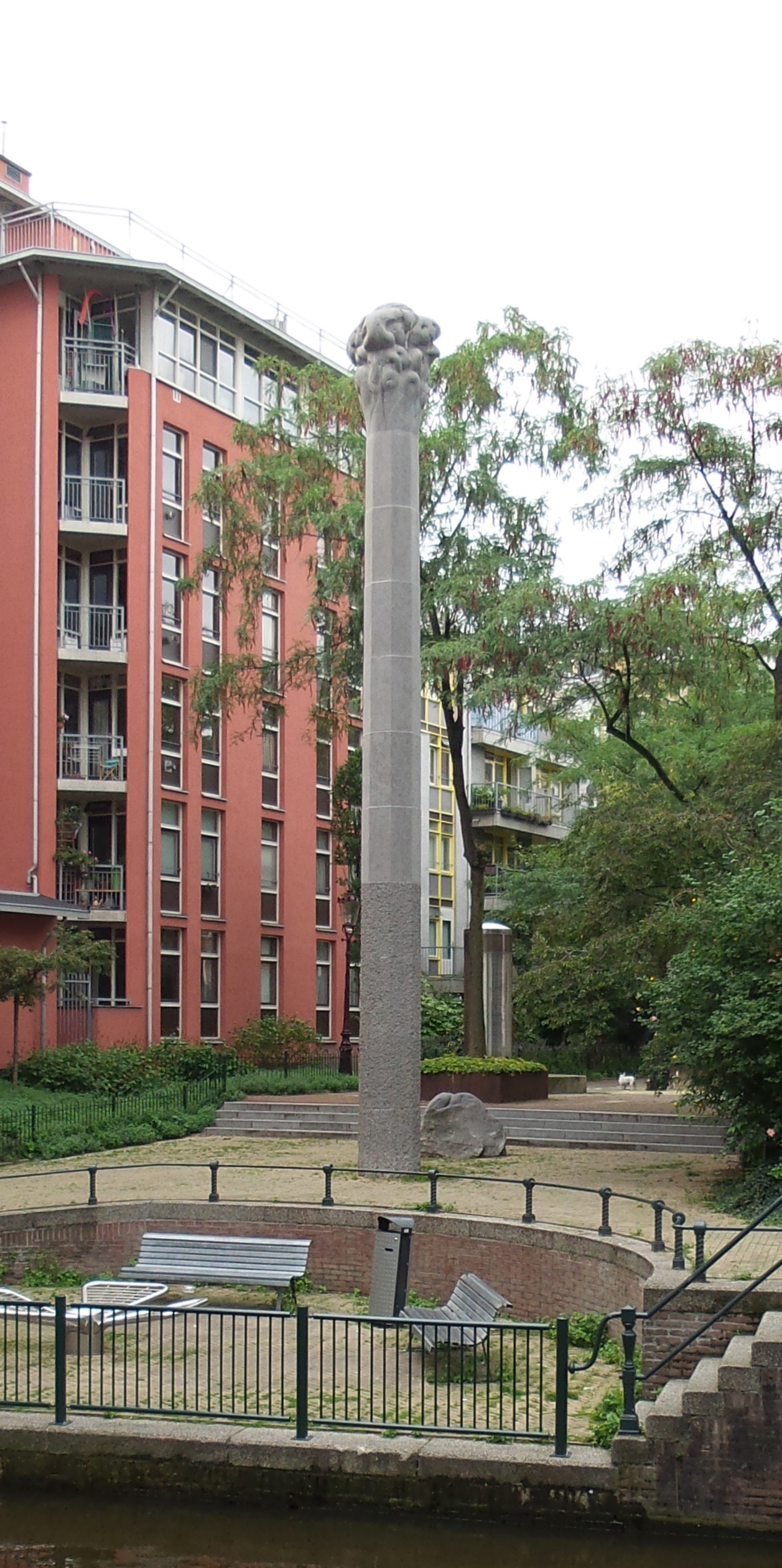 Levensboom door Wim Tap uit 1989 aan de Kromboomgracht en Snoekjesgracht. Een pyloon van blauw hardsteen. Op 2,6 meter afstand ligt een bewerkte zwerfkei